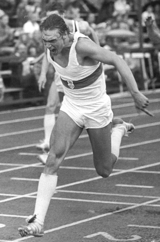 Frank Emmelmann ADN-ZB Thieme 8-8-81 Bez. Gera: DDR-Leichtathletikmeisterschaften: Neuer DDR-Meister über 100 Meter wurde der Magdeburger Frank Emmelmann mit persönlicher Bestleistung von 10,19 s bei 1,2 m-s Gegenwind.